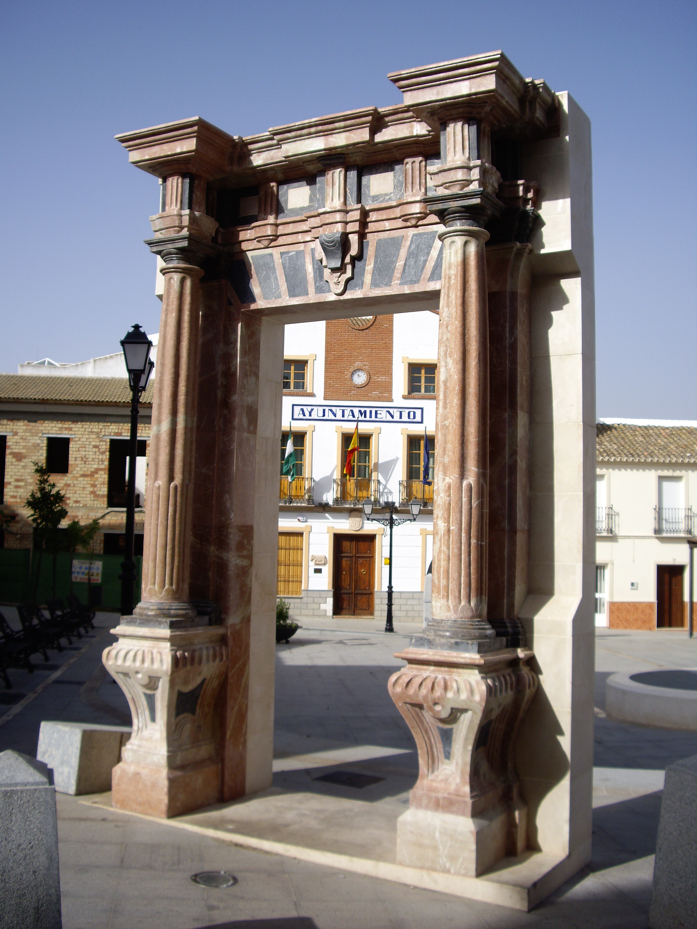 Portada de la Casa de los Condes de Teba, Plaza de la Constitución, Teba - Málaga - España